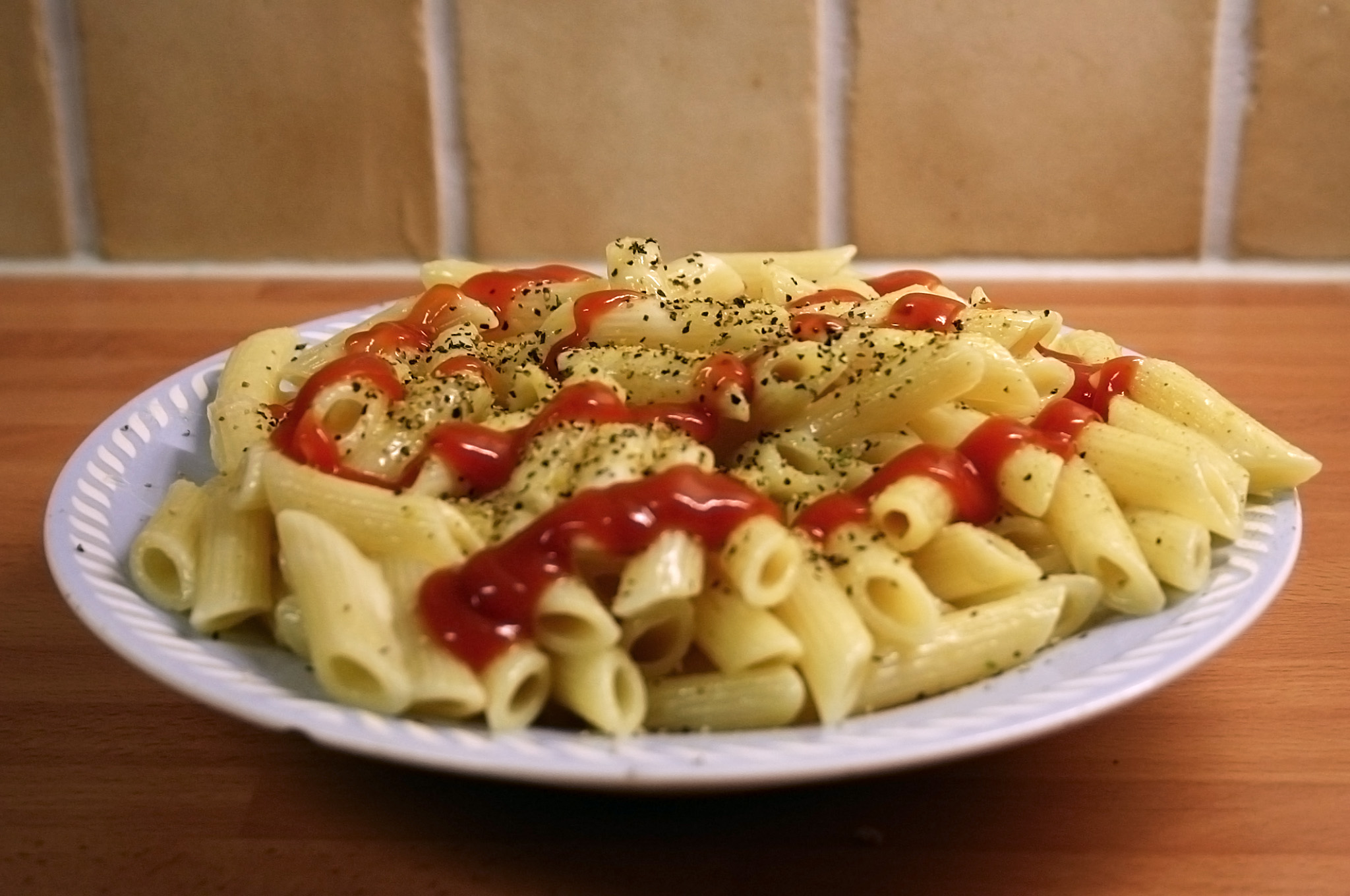 Pasta (Penne)